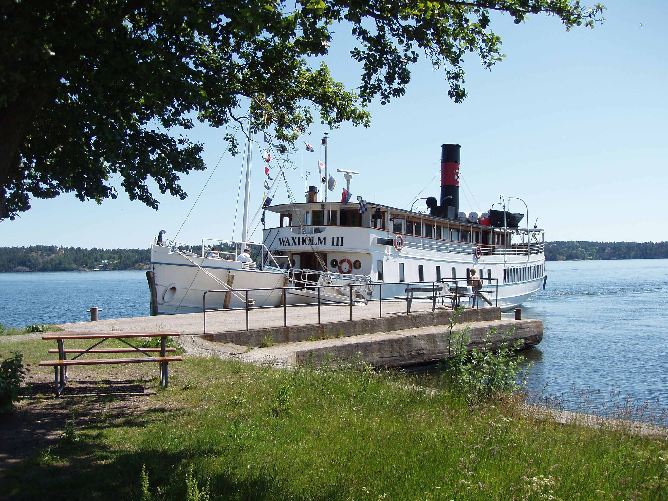 Skärgårdsbåten Waxholm III vid Söderåsens brygga, Elfvik, Lidingö.